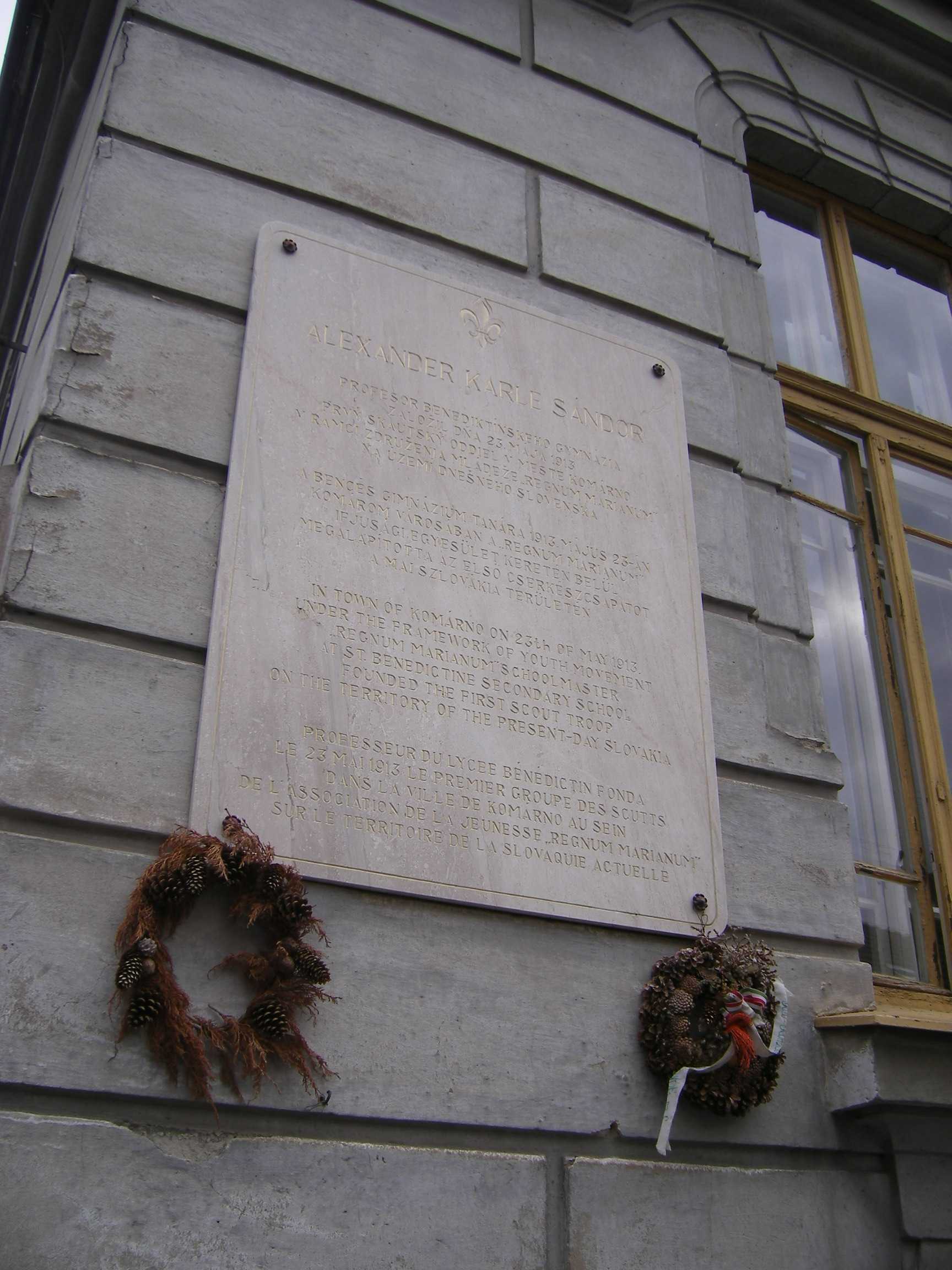 Komárom - a helyi cserkészcsapat megalakulásának emléktáblája a Selye János Gimnázium falán